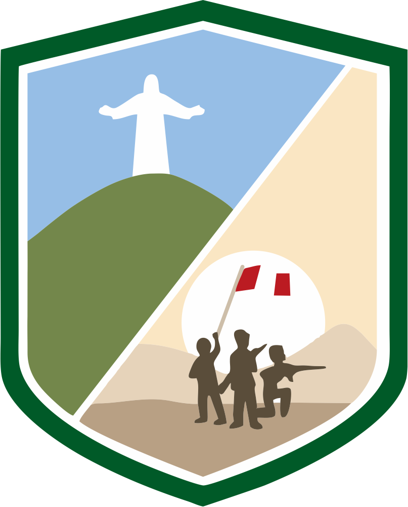 escudo actual